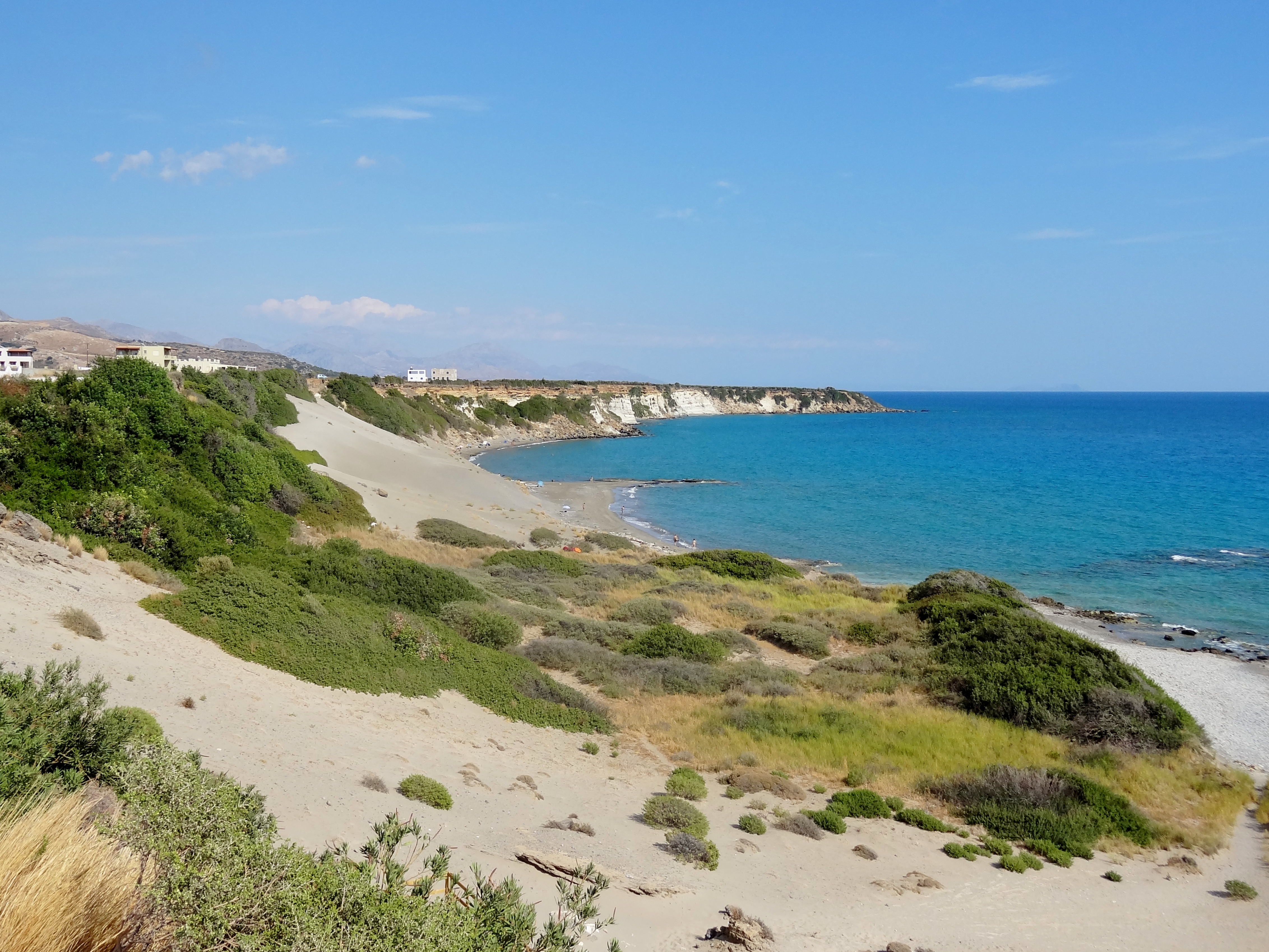 Strand von Orthi Ammos (Ορθή Άμμος), Gemeinde Sfakia, Regionalbezirk Chania, Kreta, Griechenland